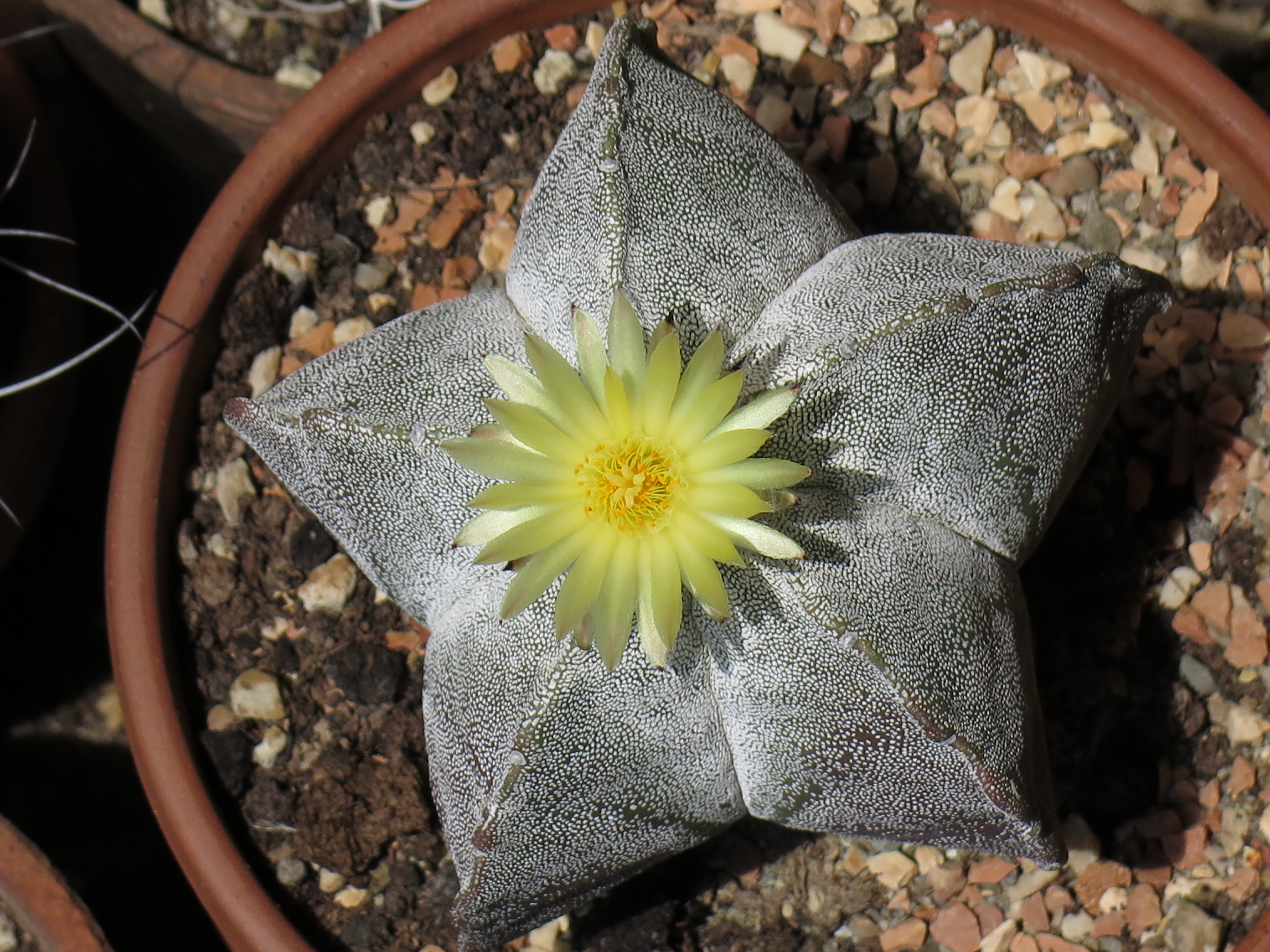 Astrophytum myriostigma in fiore